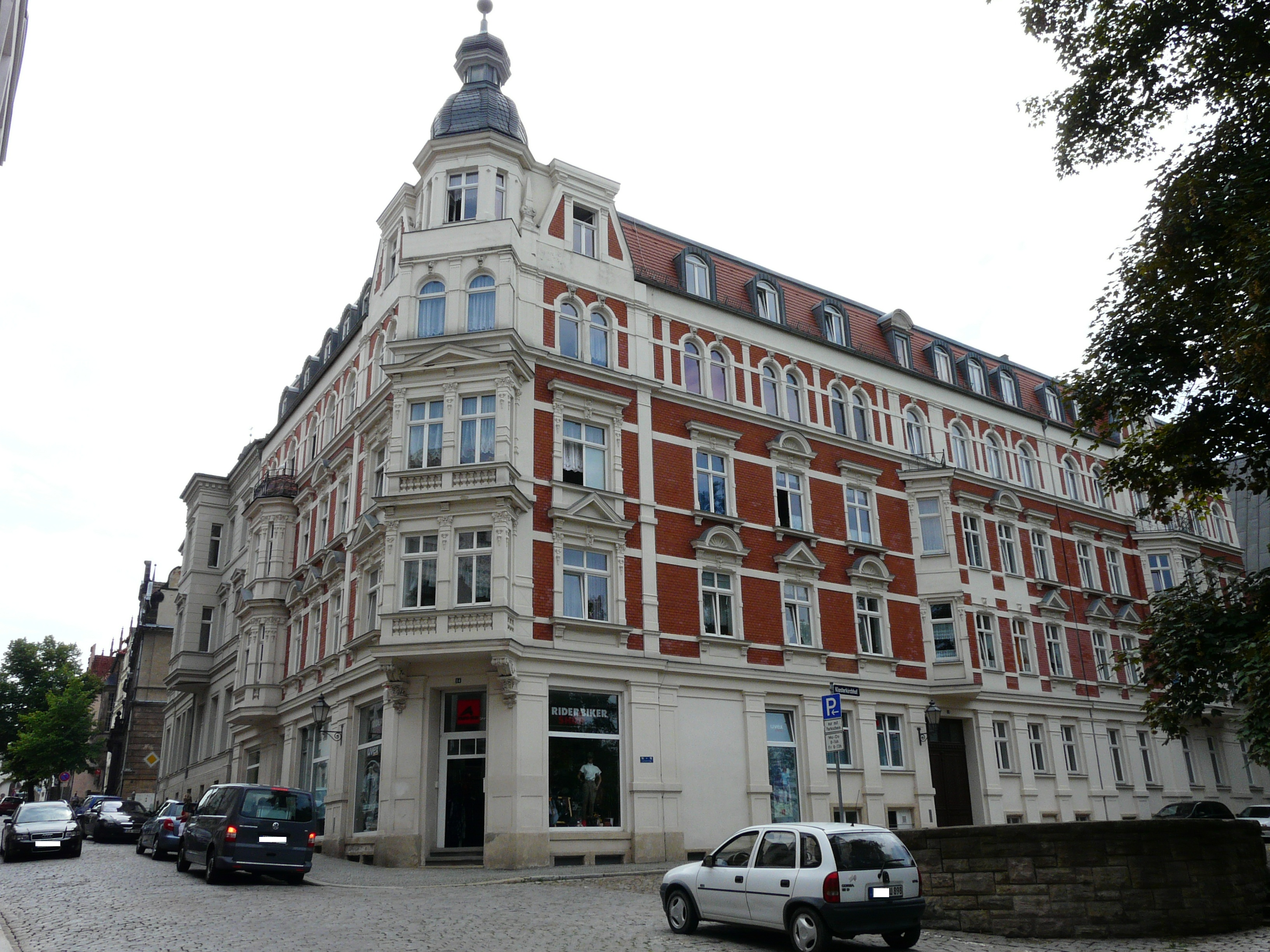 Wohn- und Geschäftshaus der Familie Jubelt in Zeitz, war zum Zeitpunkt der Errichtung das größte Wohnhaus der Stadt